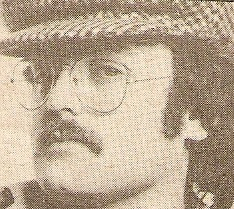 Carlos Ulanovsky